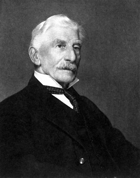 John Augustus Voelcker c. 1915